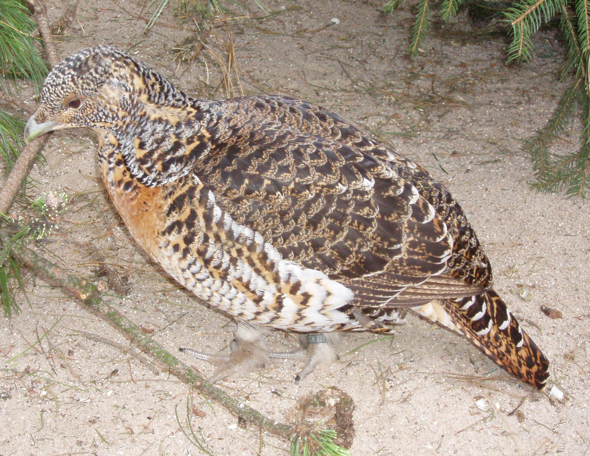 Auerhuhn